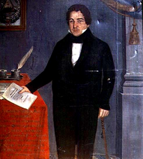 Retrato de presidente Mariano Rivera